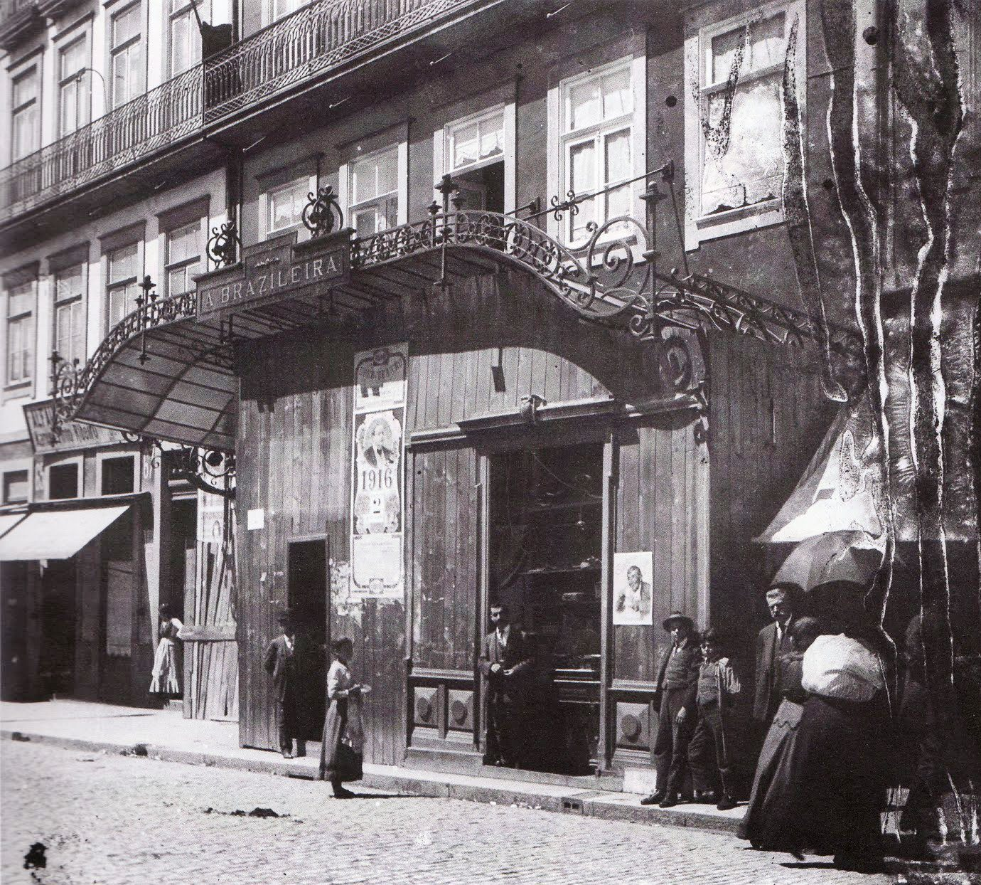 Exterior do café A Brazileira, em 1916 (APR)